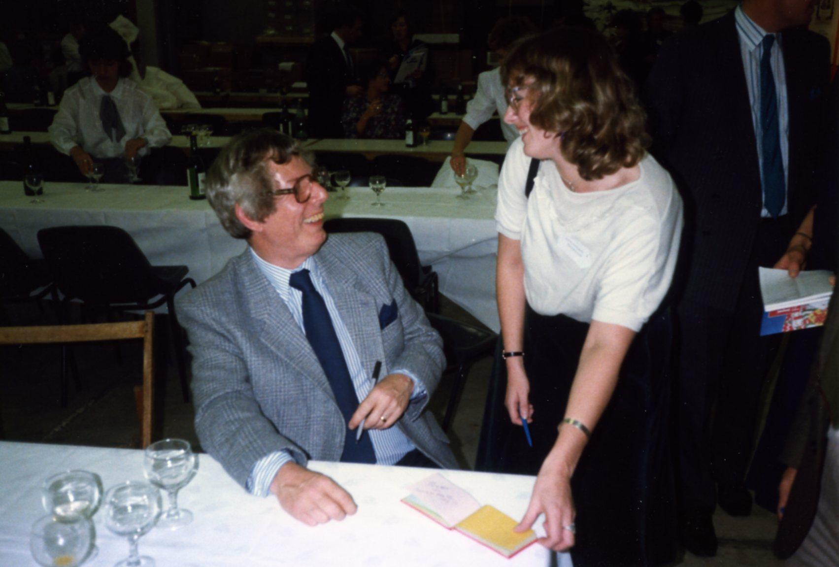 Derek jameson